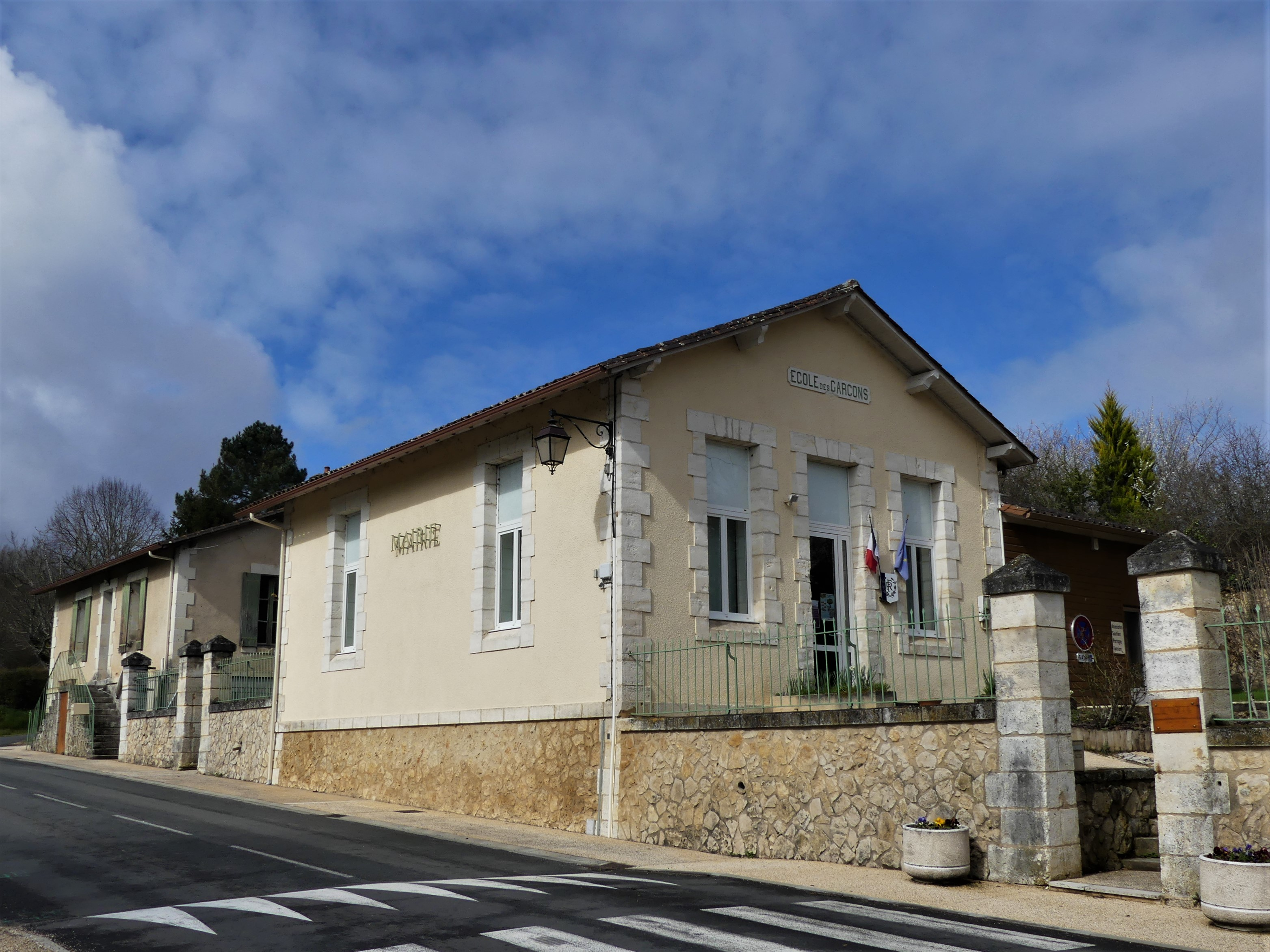 La mairie et l'ancienne école de Beleymas, Dordogne, France.